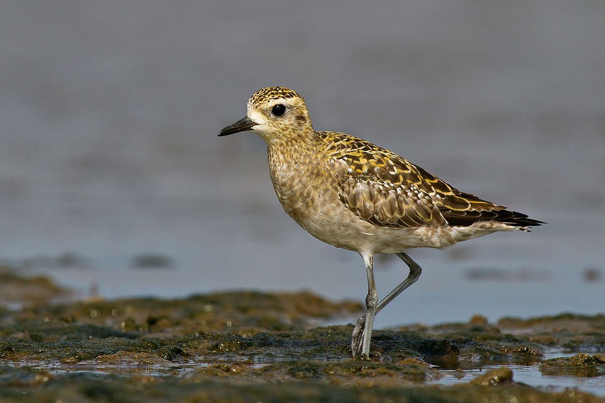 Shoalhaven Heads